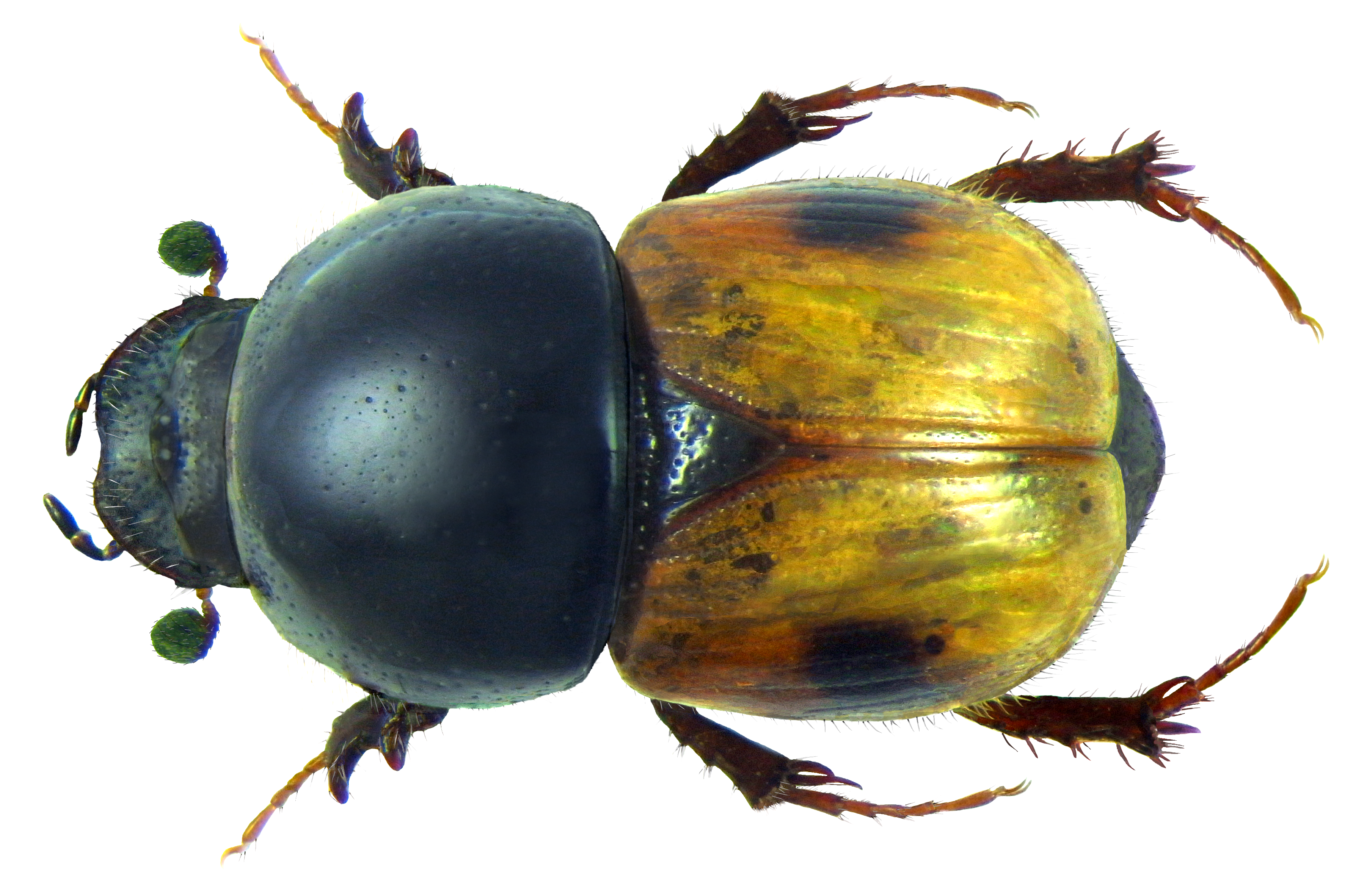 Familie: Scarabaeidae Groesse: 4,3 mm Fundort: Tunesien, Hammamet leg.det. U.Schmidt, 26.V.-1.VI. 1993 Photo: U.Schmidt, 2012